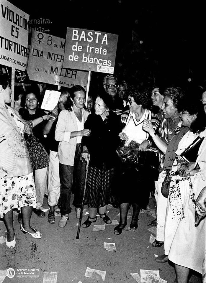 "Alicia Moreau de Justo marchando contra la violencia de género. Buenos Aires, mayo de 1986."